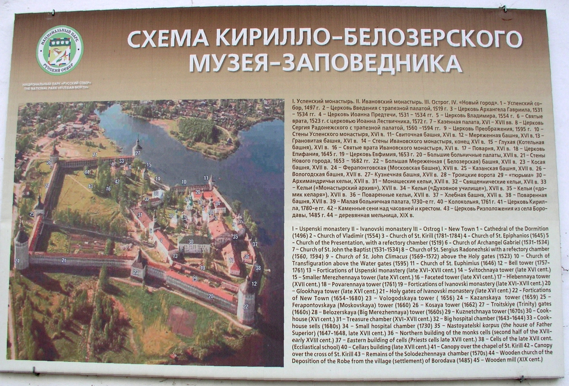 Darstellung der Klosteranlage an einer Eingangsmauer